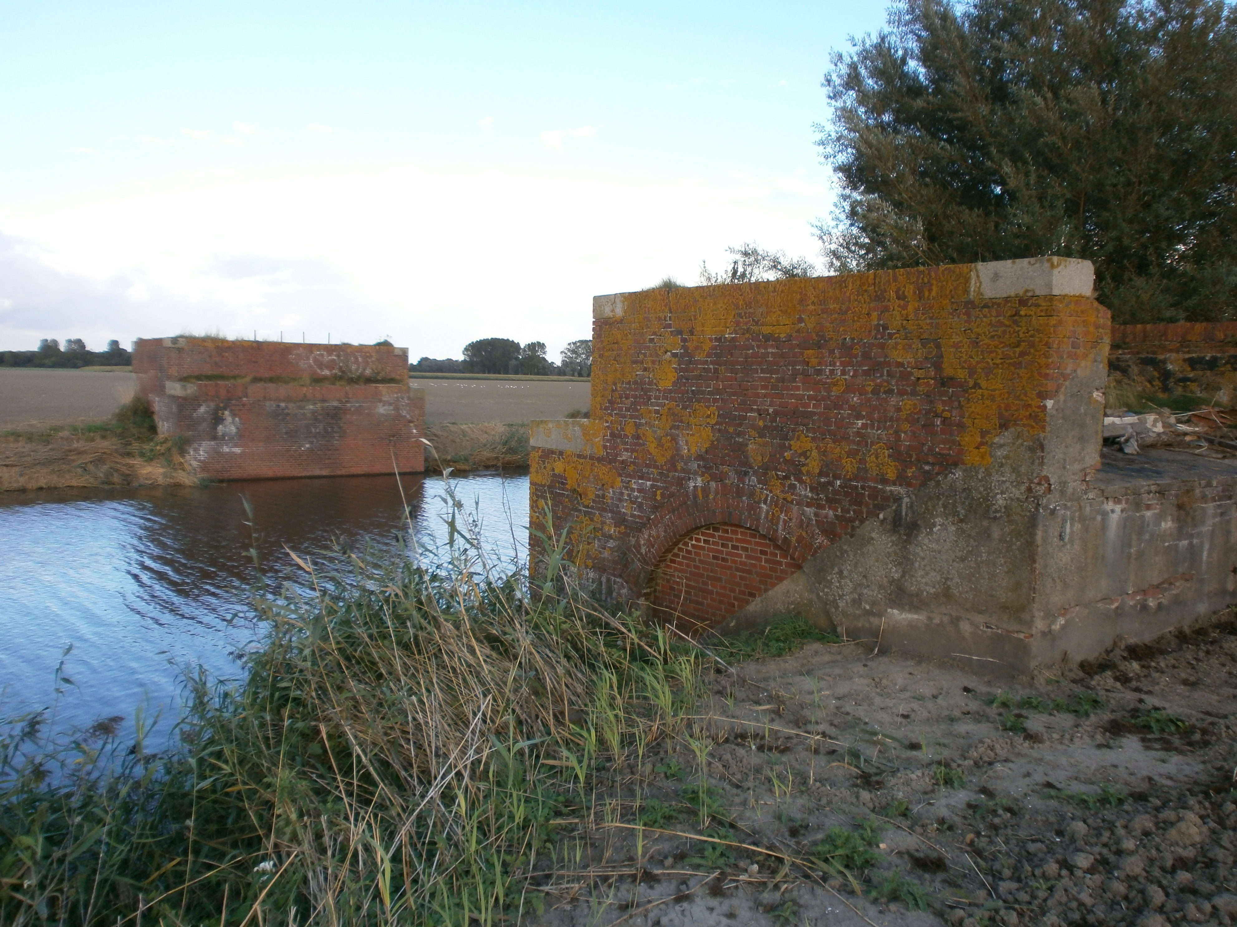 Restand van een van de bruggen in de in 1940 opgeheven Marnelijn